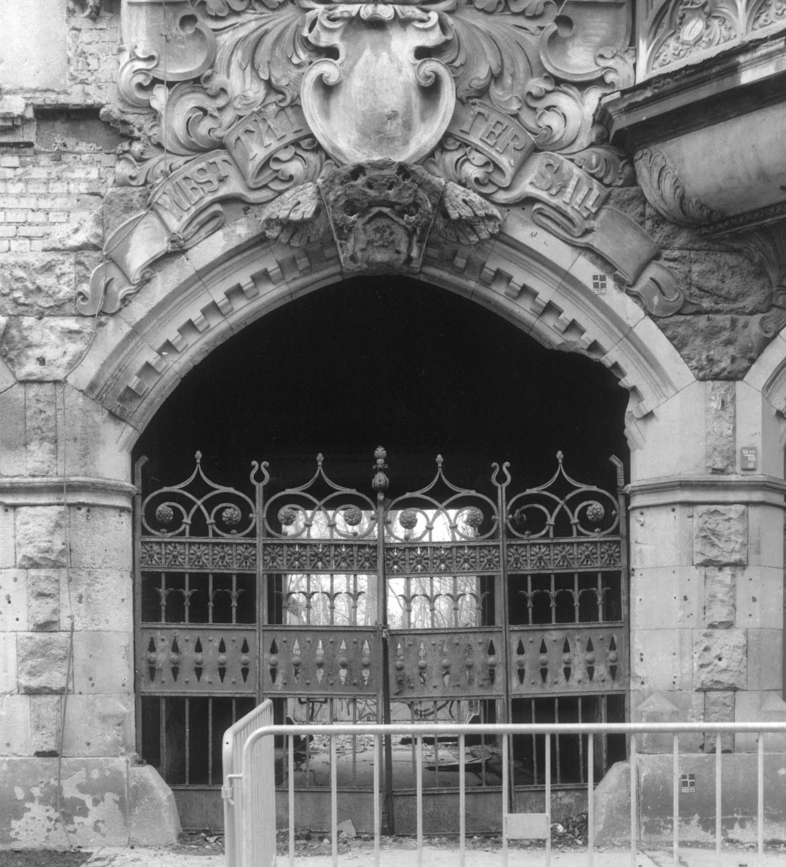 "Märchenhaus", Friedrich-Ebert-Straße 81, Leipzig. Situation kurz vor dem Abriß